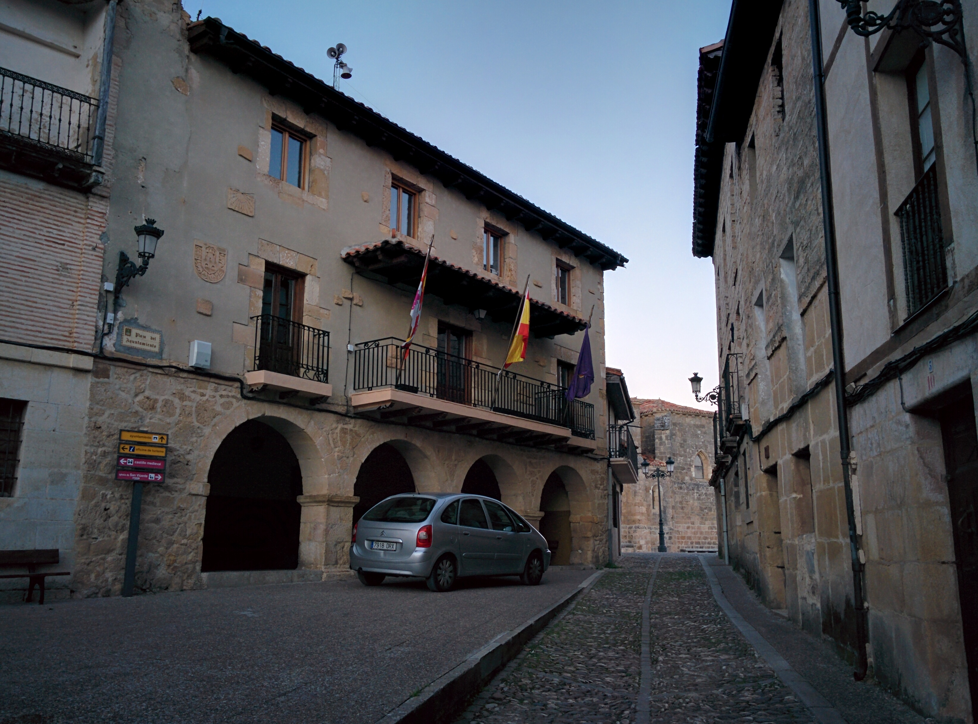 Casa consistorial de Frías (Burgos, España).